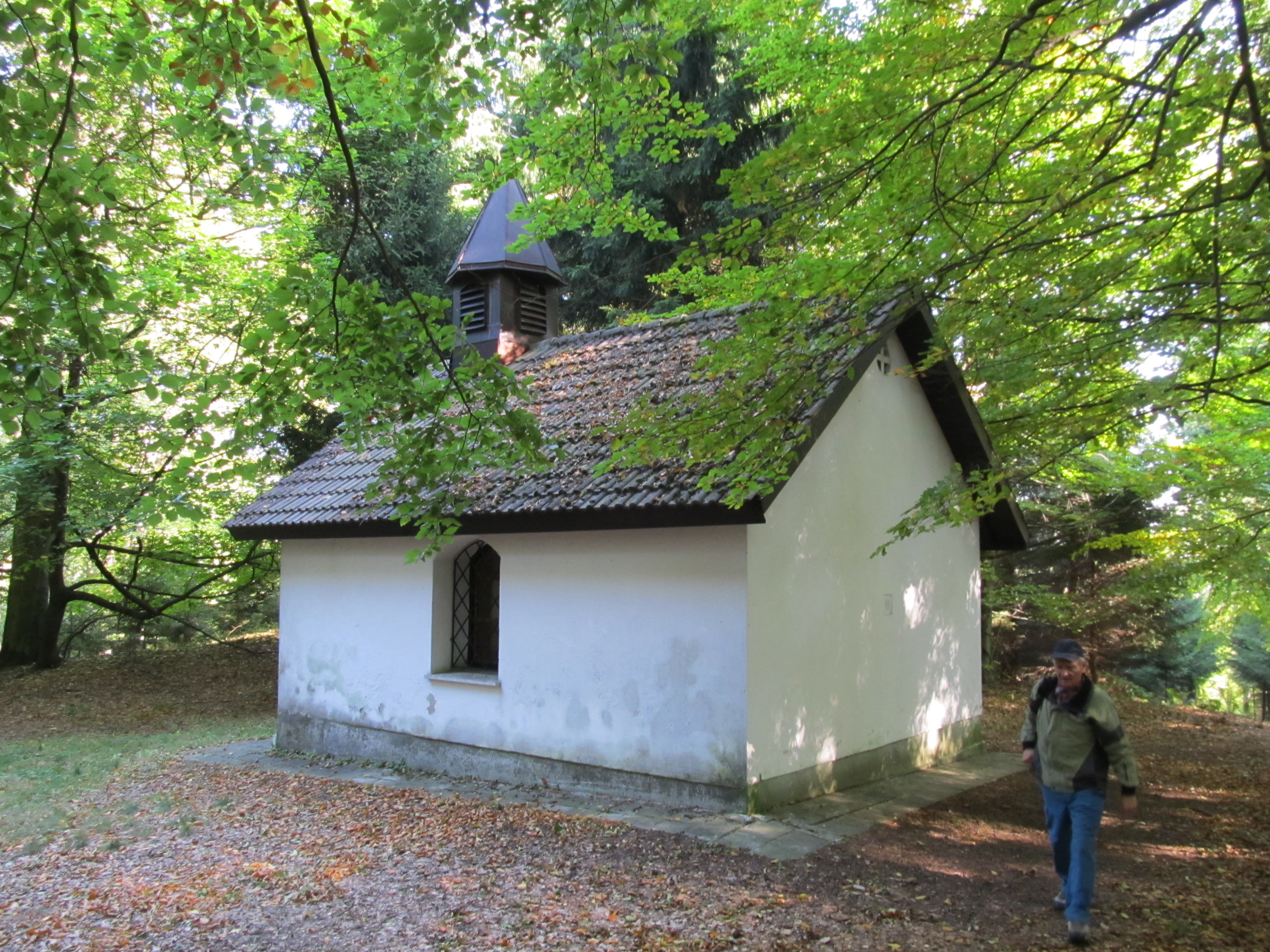 Liščí - kaple sv. Bernarda (Medvědí kaple)